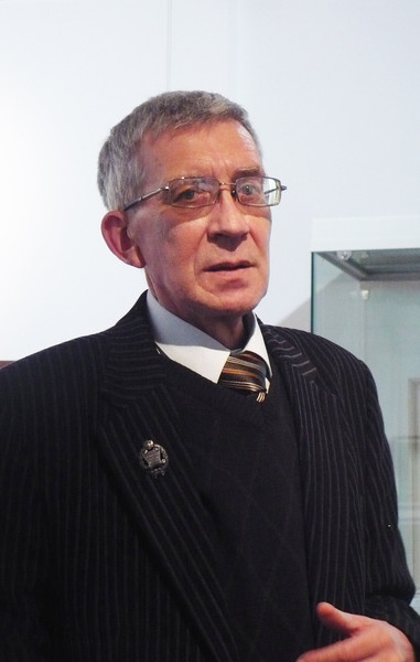 Белов Сергей Павлович